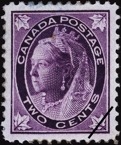 Timbre-poste du Canada 2 cents 1897 éfigie Victoria feuille d'érable